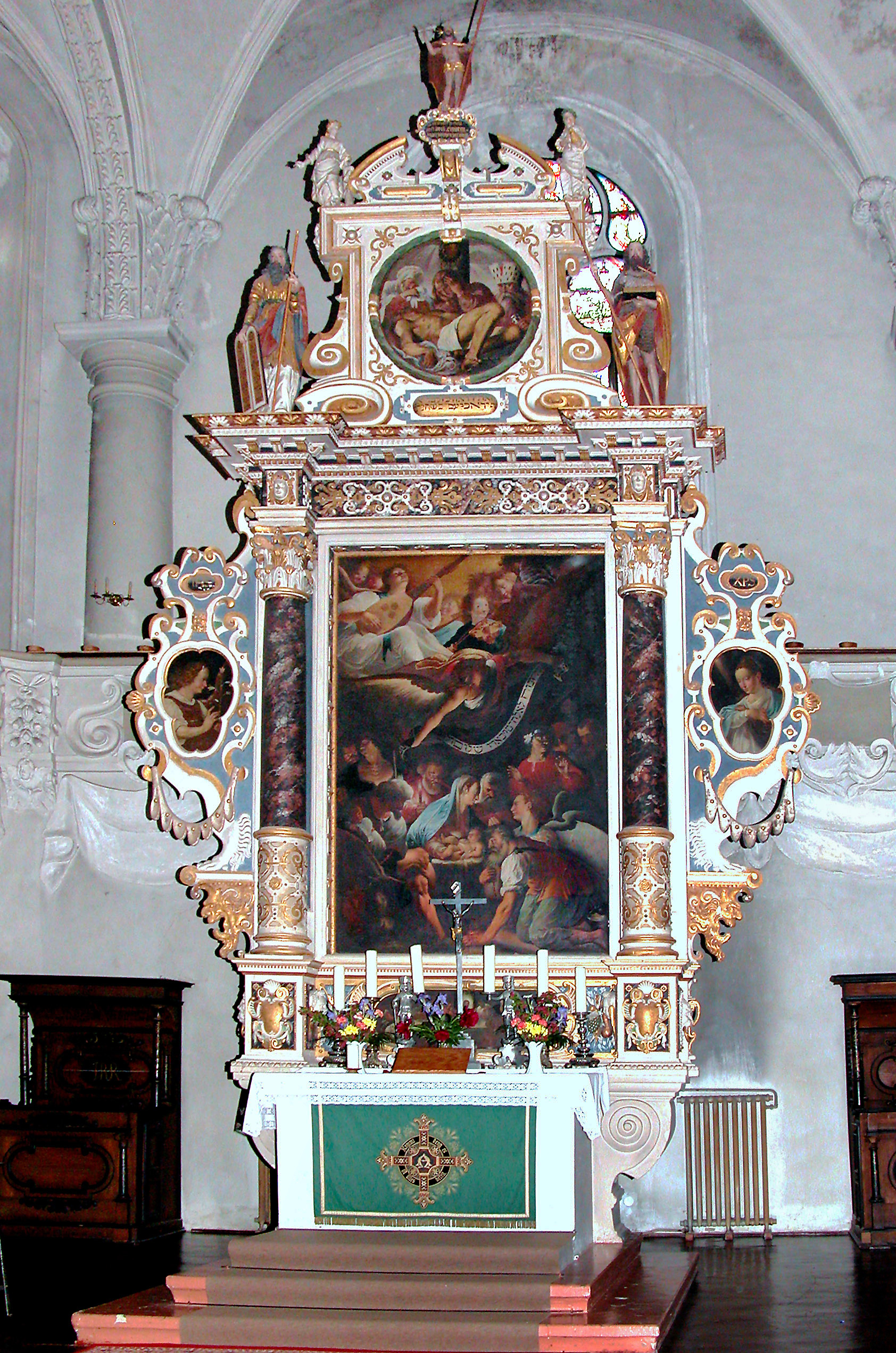 16.06.2004 09406 Marienberg, Marienstraße (GMP: 50.650456,13.165675): St. Marien Kirche. Spätgotischer Bau (1558-1564). Altaraufsatz 1617 von A. Helmert, Gemälde 1616 von K. Fabritius. [DSCN3845.TIF]20040616150DR.JPG(c)Blobelt